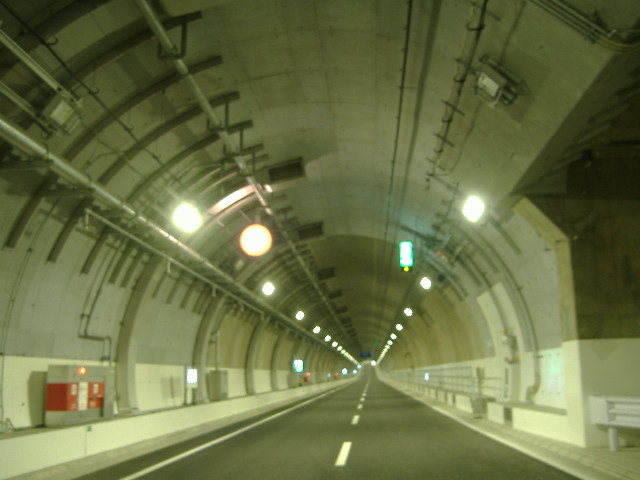 首都高速道路中央環状線山手トンネル、内回り西池袋入口付近。2007年12月8日に妖精書士が撮影。